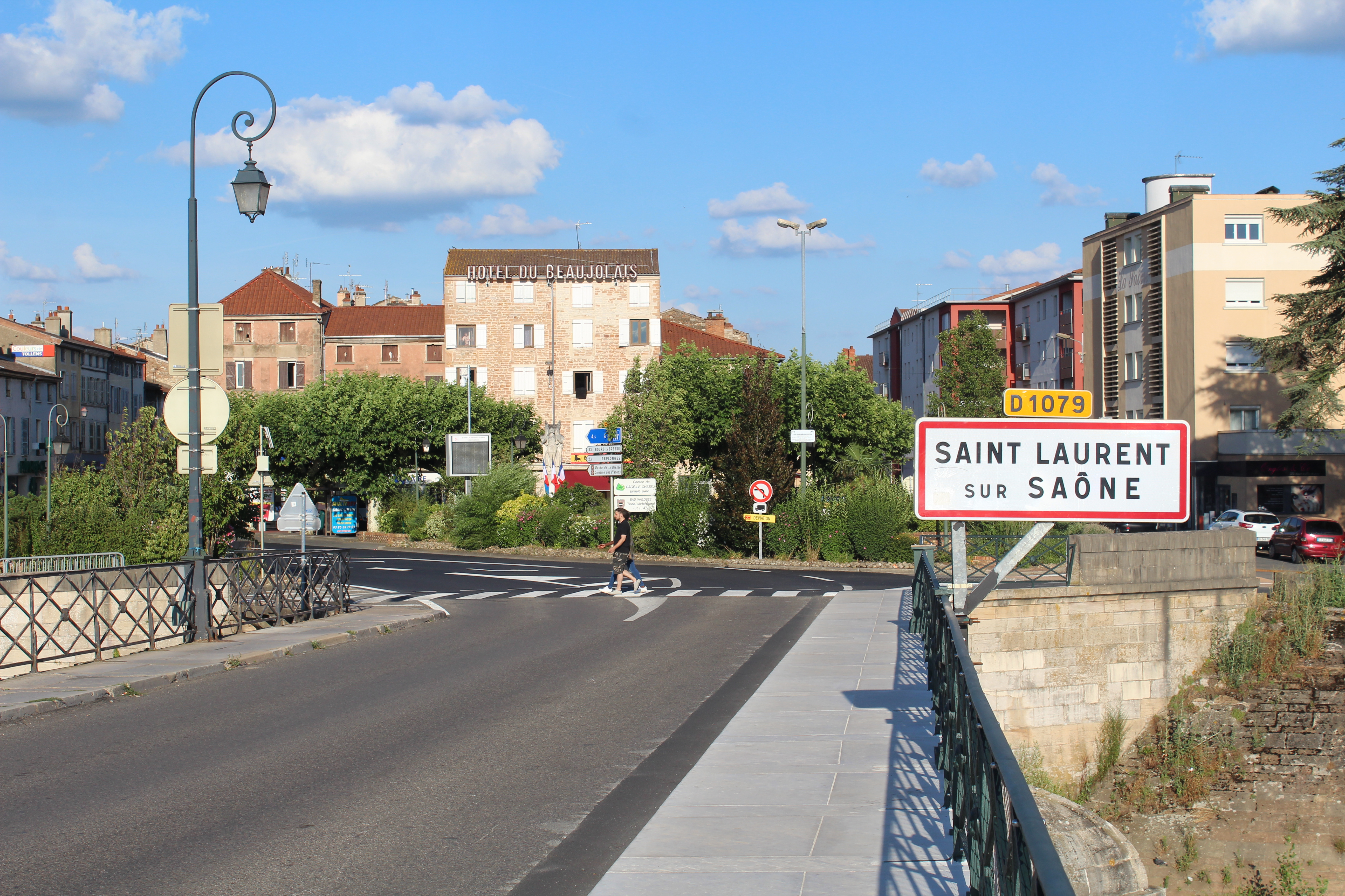 Route D1079 au pont Saint-Laurent à Saint-Laurent-sur-Saône.